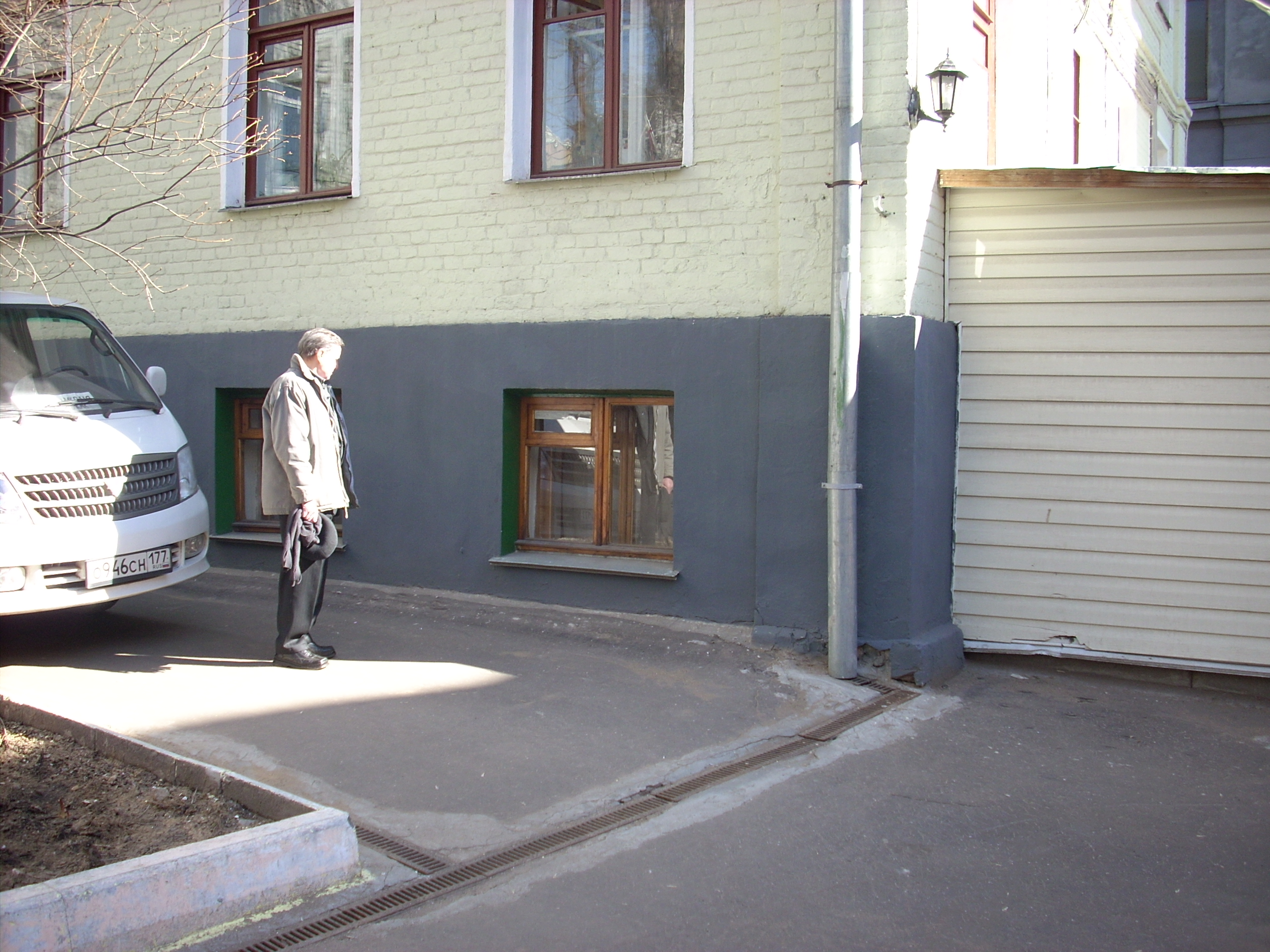 Окно бывшей комнаты схим. Гавриилы на ул. Маросейка, дом 5. Москва, 2017 год.